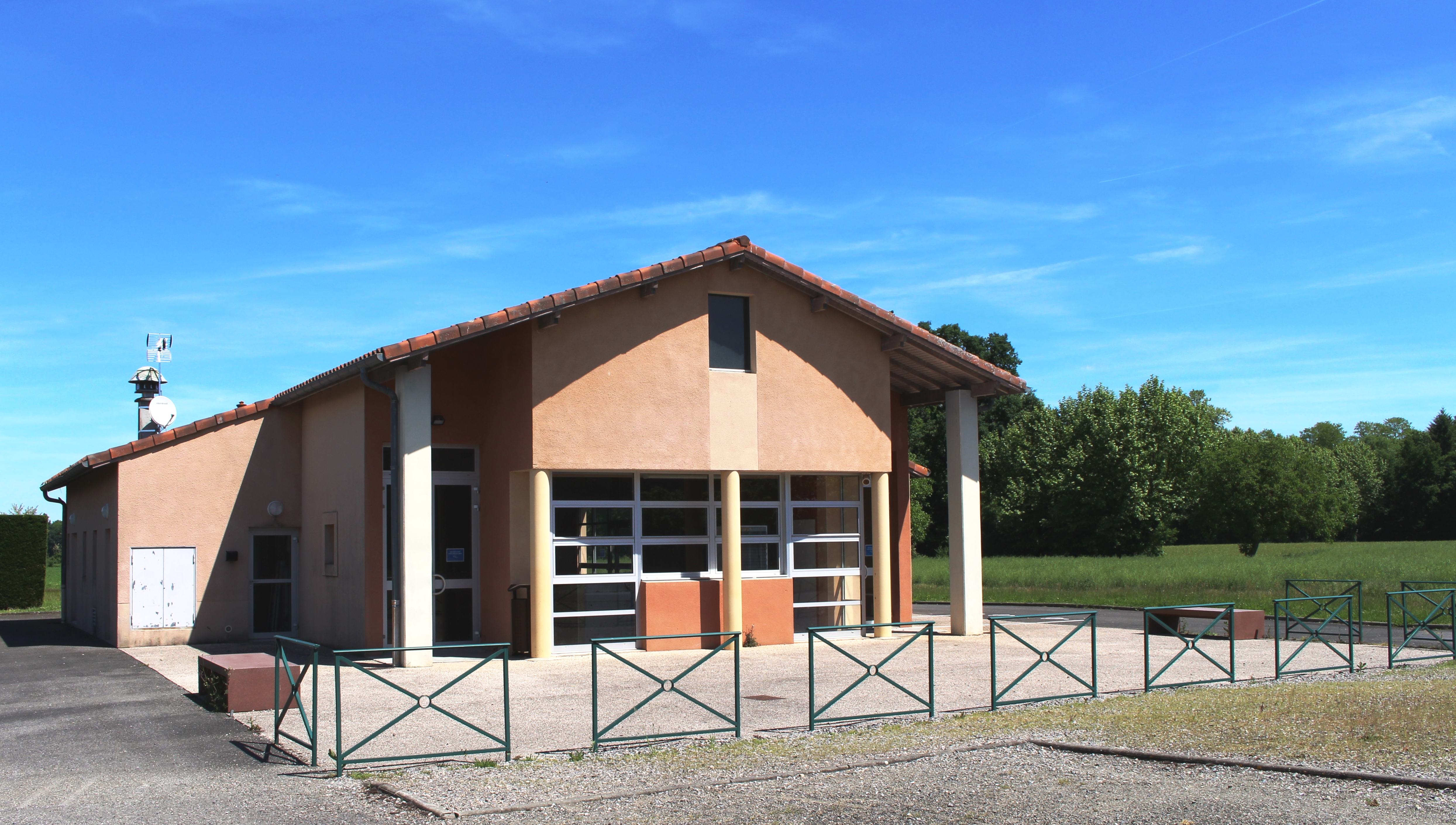 Salle des fêtes de Villenave-près-Marsac (Hautes-Pyrénées)